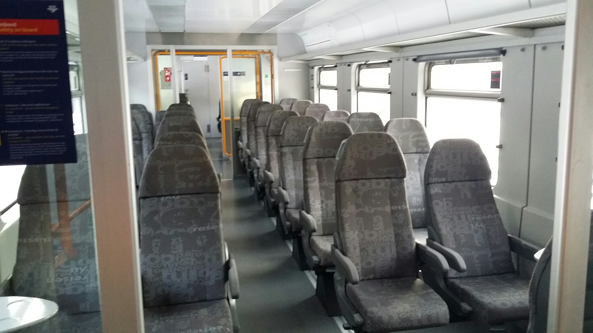 BS 69.659 med nye seter 2 + 2 i bredden.